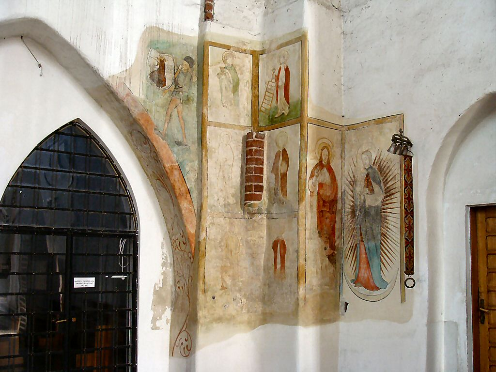 Kościół św. Jana Ewangelisty w Szczecinie - polichromie